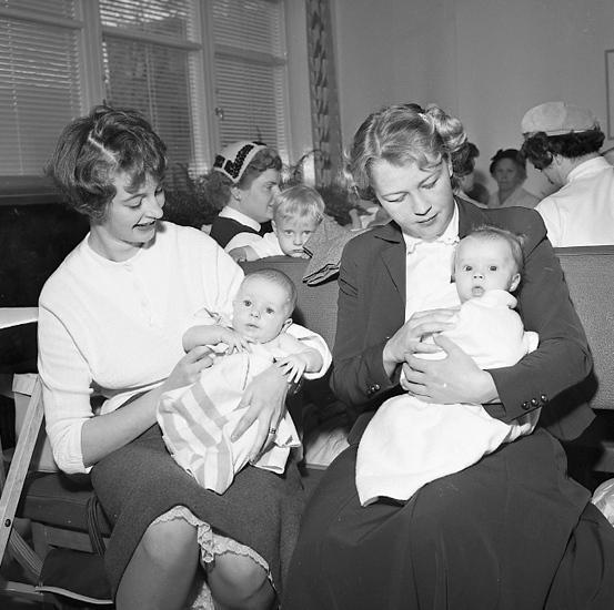 Barnavårdscentral ersätter husläkare.